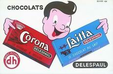 Photo de publicité pour du chocolat Delespaul-Havez. L'entreprise est fermée depuis 1976